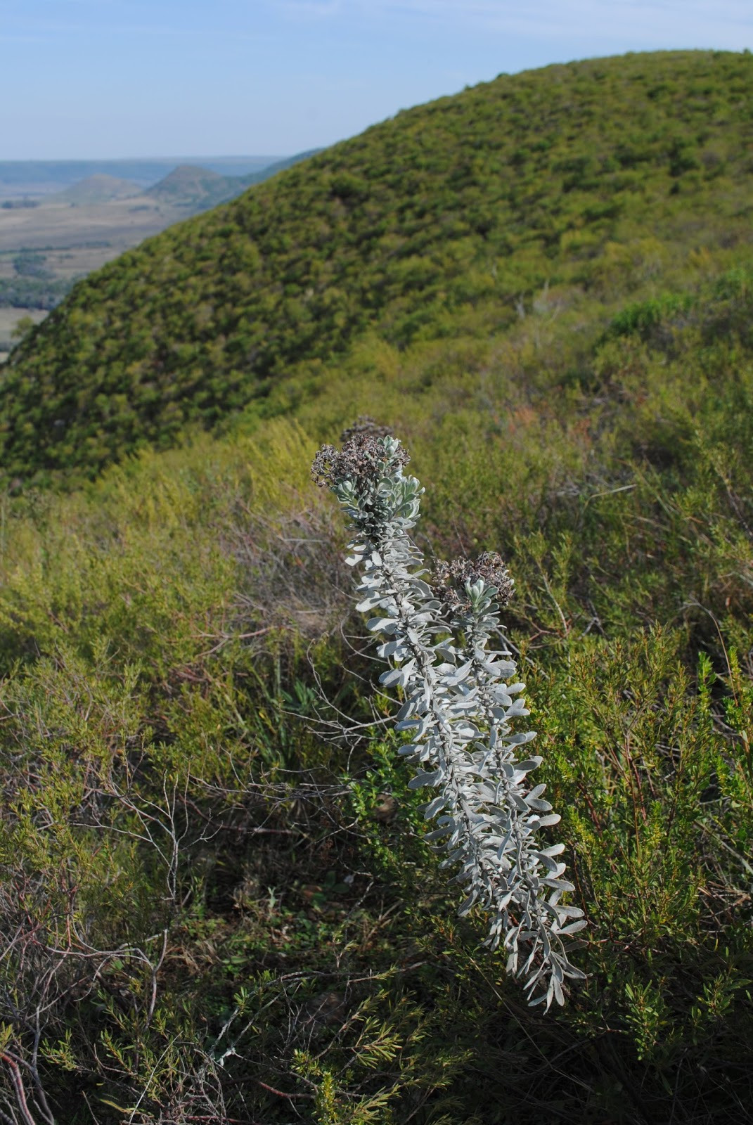 Eupatorium spathulatum. Asteraceae. Fotos tomadas en laderas de Cerros al margen de la Ruta 30 en Bajada de Pena, departamento de Rivera, Uruguay.